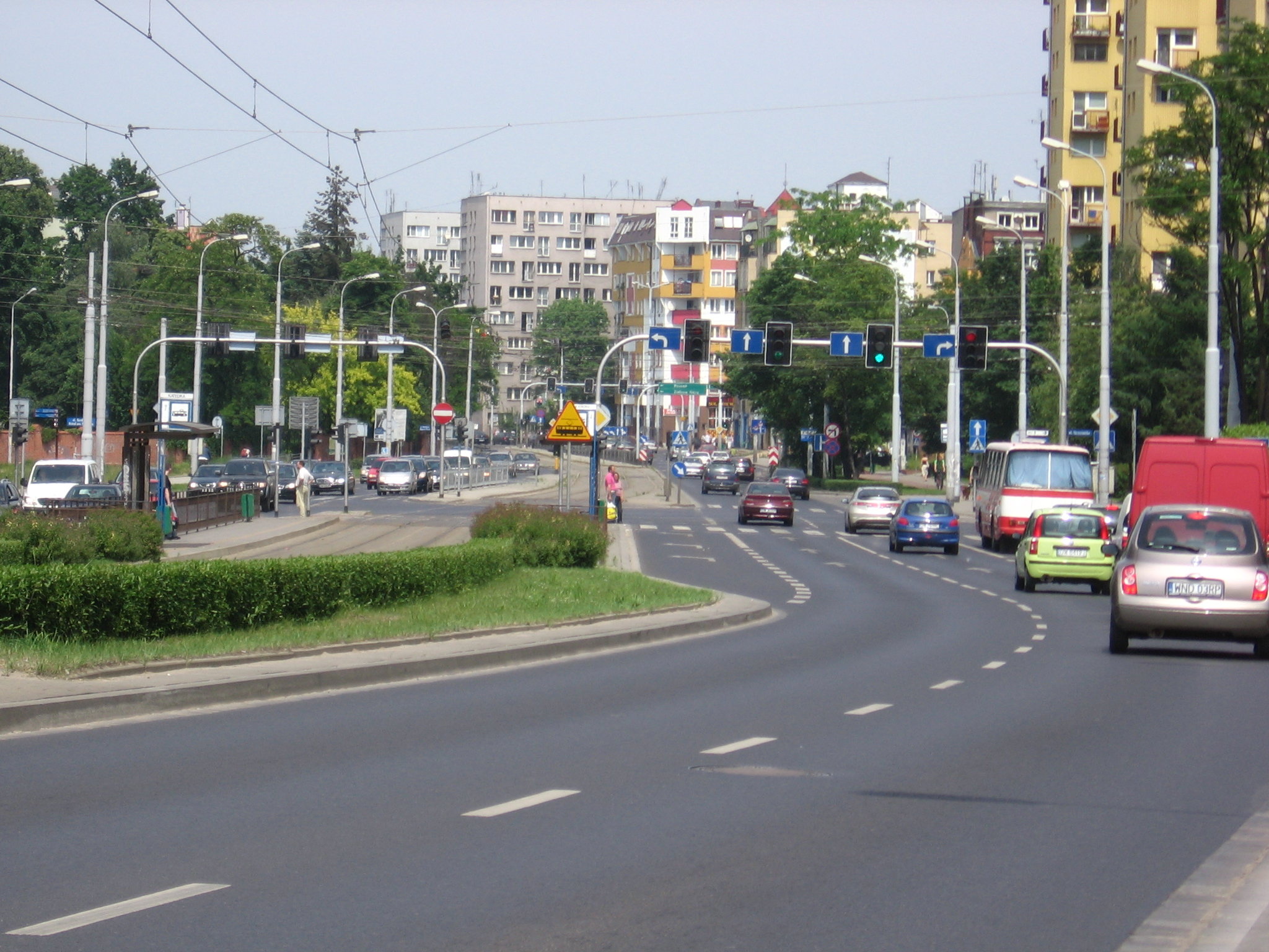 ulica Kardynała Stefana Wyszyńskiego we Wrocławiu, widok z Mostu Pokoju na północ